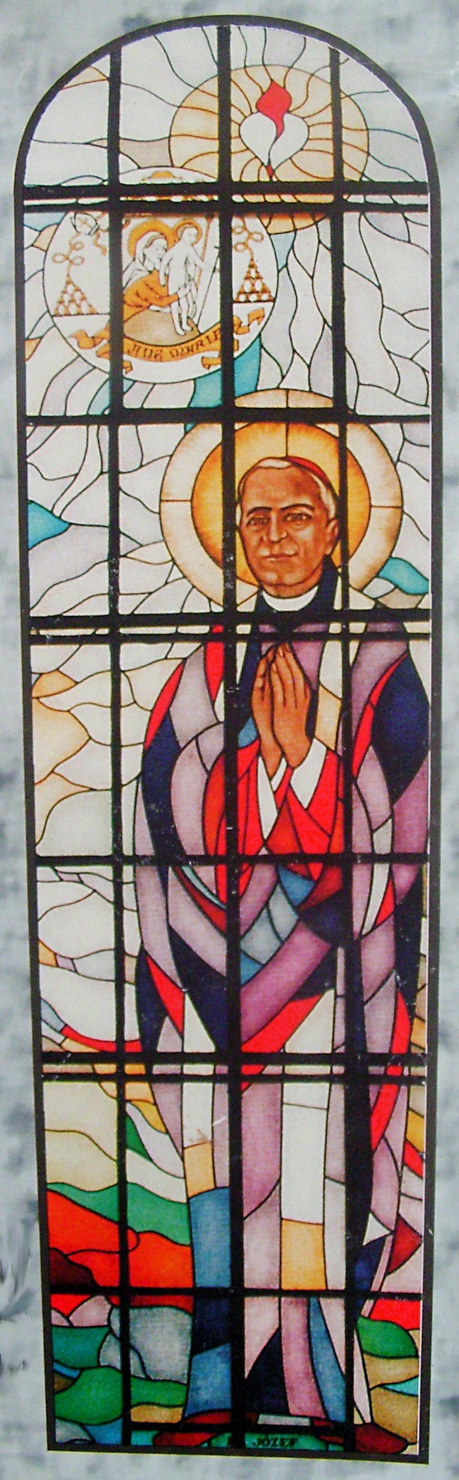 św. Józef Sebastian Pelczar - witraż w kościele Imienia Maryi w Bączalu Dolnym (diecezja rzeszowska)